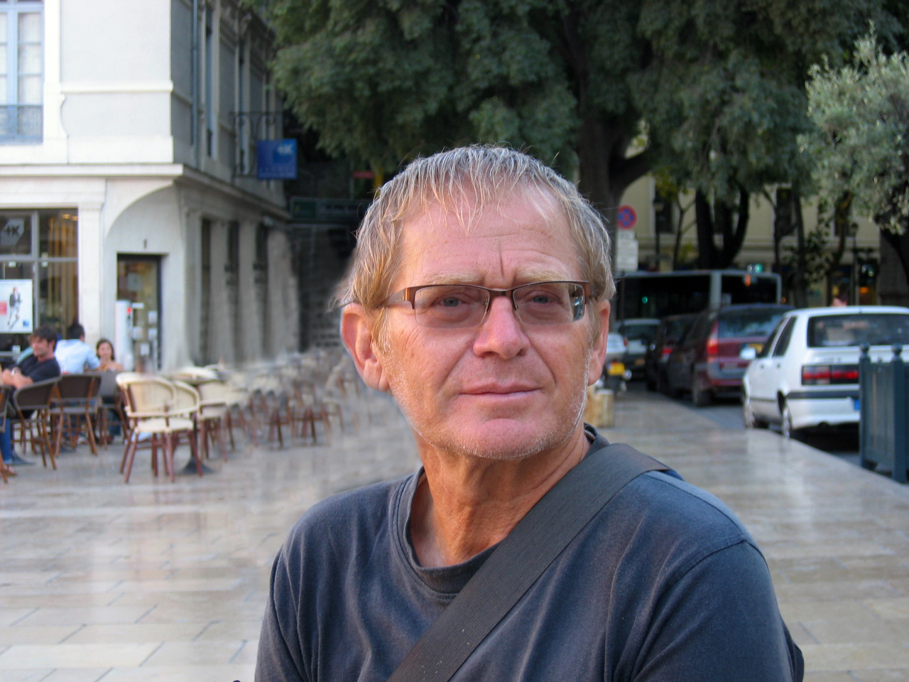 ארתור סג"ל ארכאולוג ישראלי פרופסור באוניברסיטת חיפה